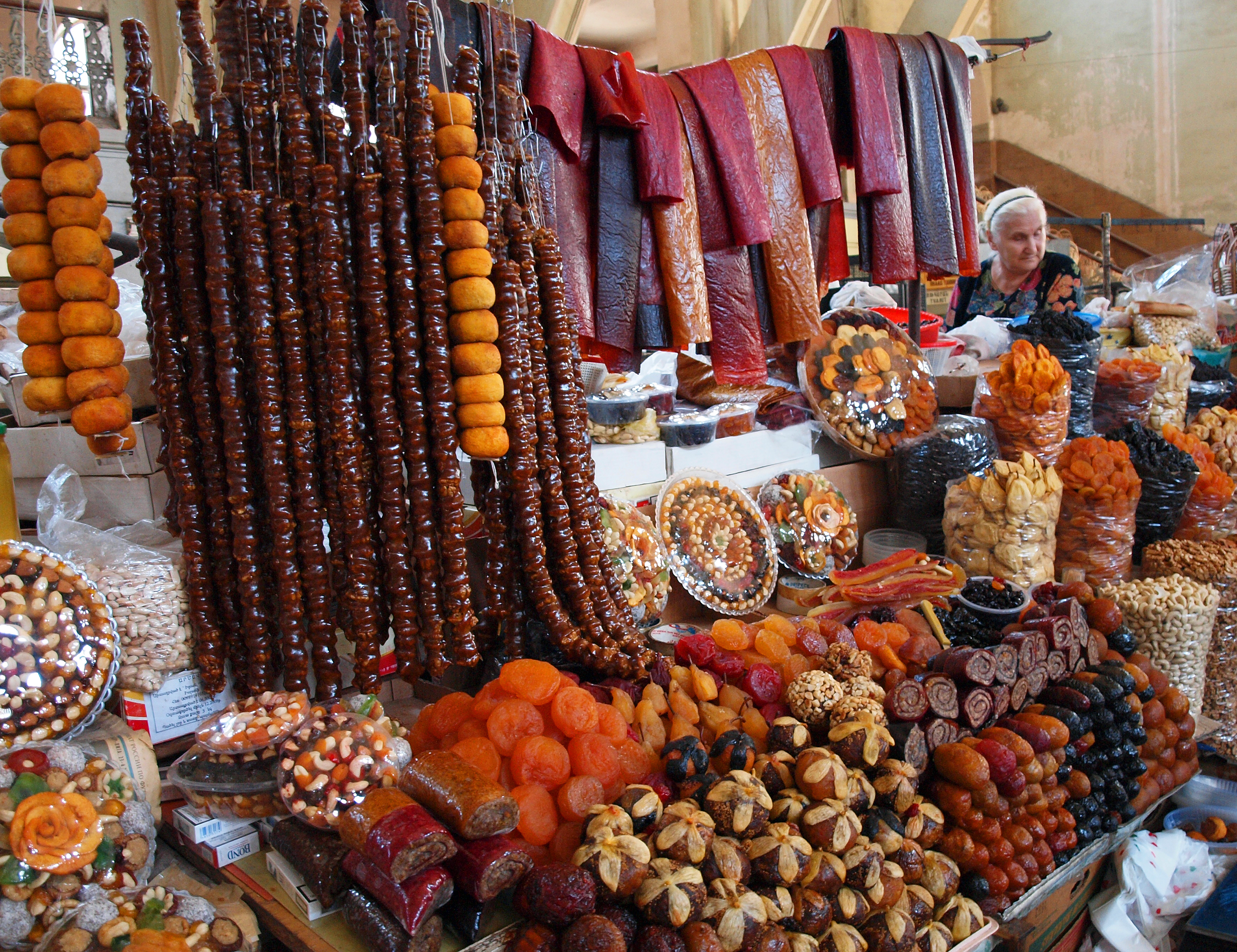 Yerevan Market